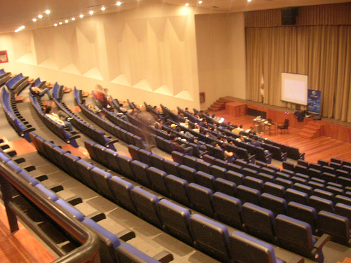 Auditorio principal "Ella Dunbar Temple", en la sede del Rectorado (UNMSM)